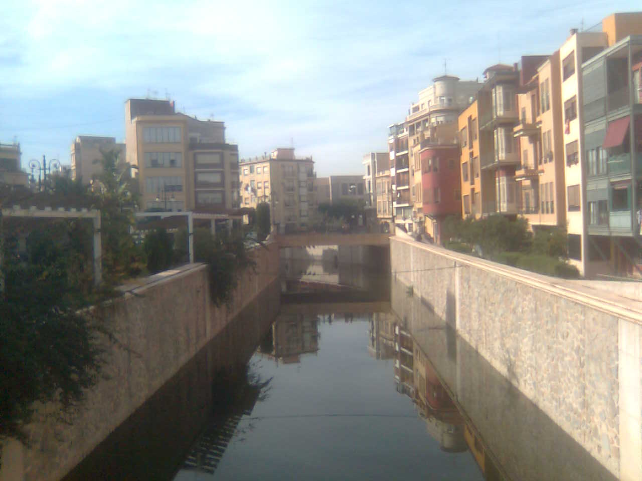 vista del río Segura en Orihuela